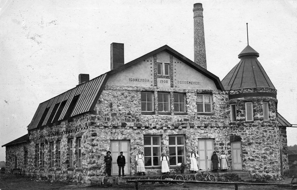 Isonkyrön vanha meijeri